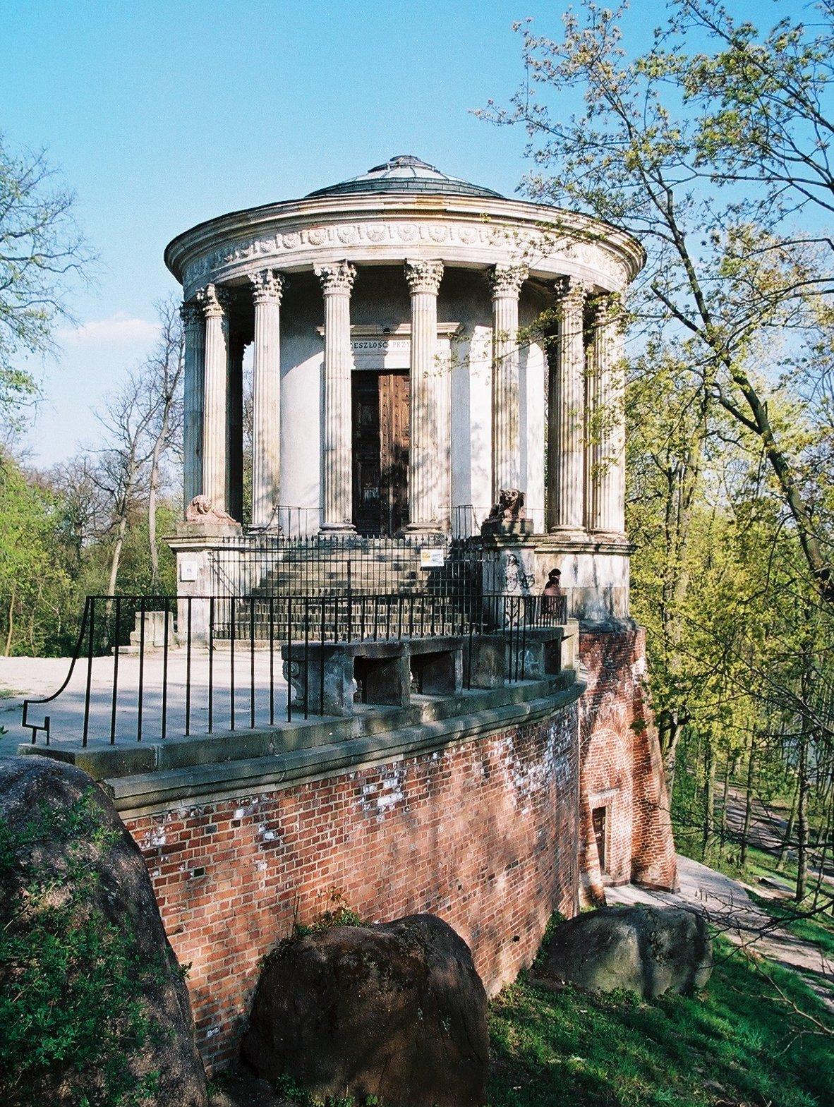 Świątynia Sybilli in Puławy, Poland; view from north-west, Pałac Czartoryskich is behind